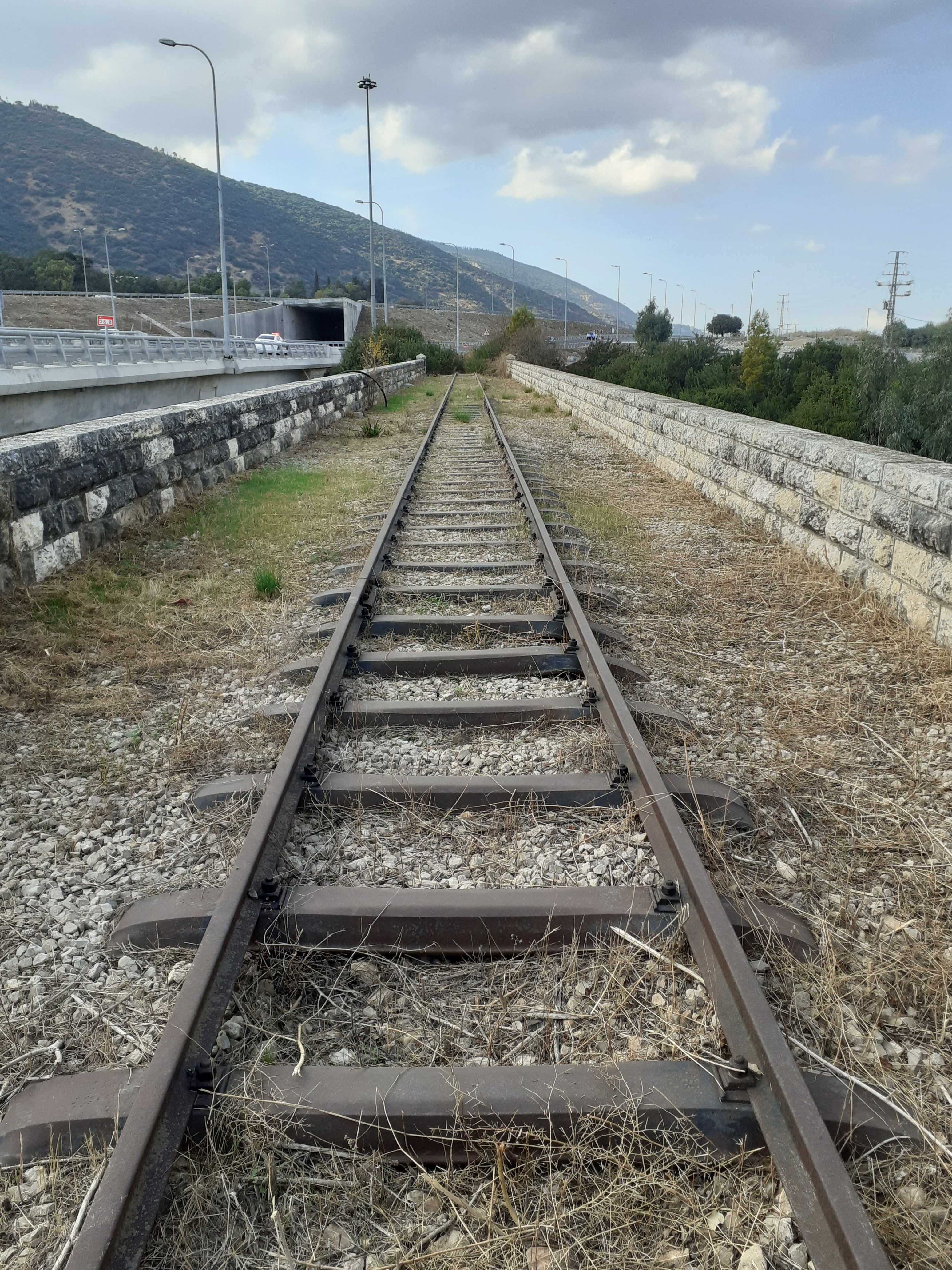 זו מסילת הרכבת המקורית שהונחה בסביבות 1902 על הגשר